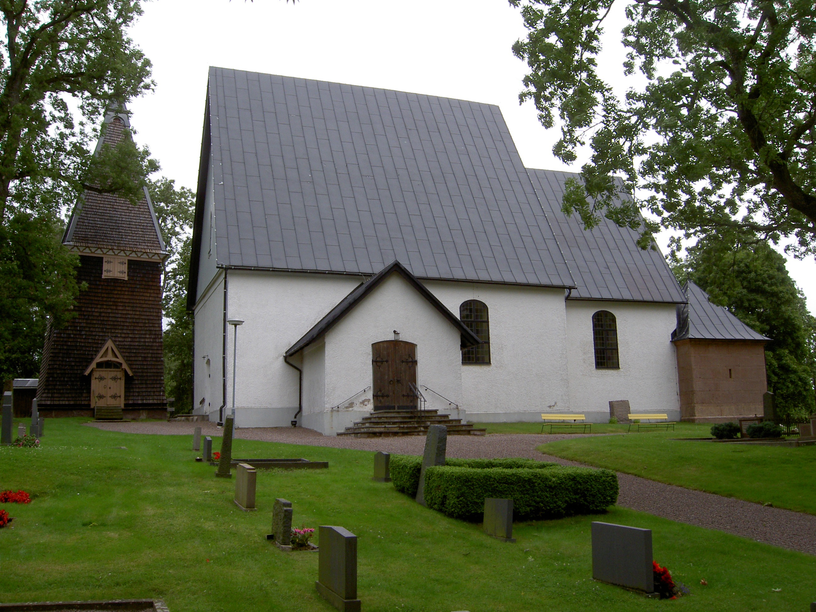 Grevbäcks kyrka